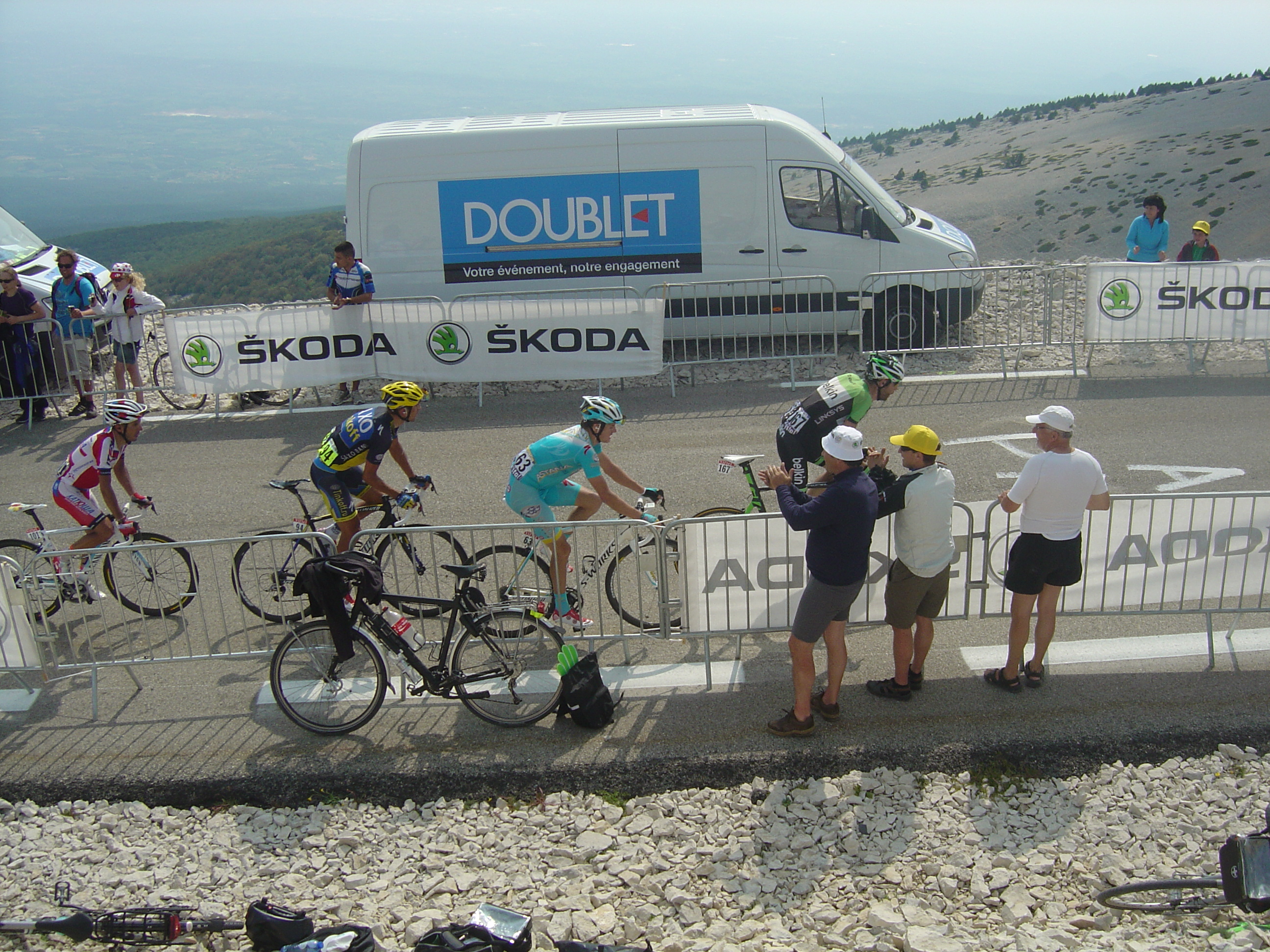 15ème étape du Tour de France 2013 entre Givors et le Mont Ventoux. Arrivée au Mont Ventoux. Groupe de Roman Kreuziger et Joaquin Rodriguez